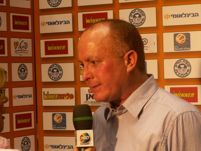 ארז אדלשטיין צולם על-ידי אבי קדמי This picture was taken by Avi Kedmi